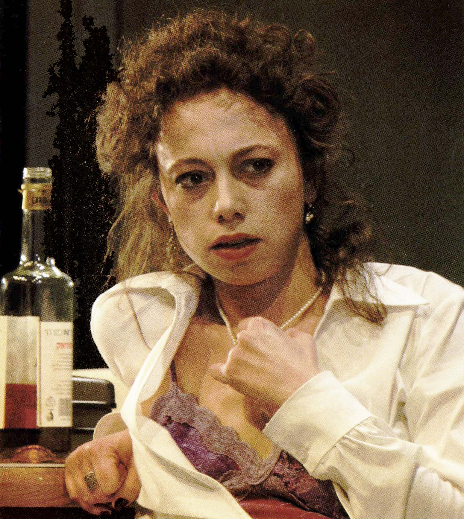 קרן צור בהצגה סינית אני מדברת אליך